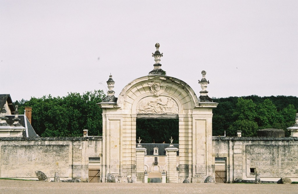 Portail du Liget